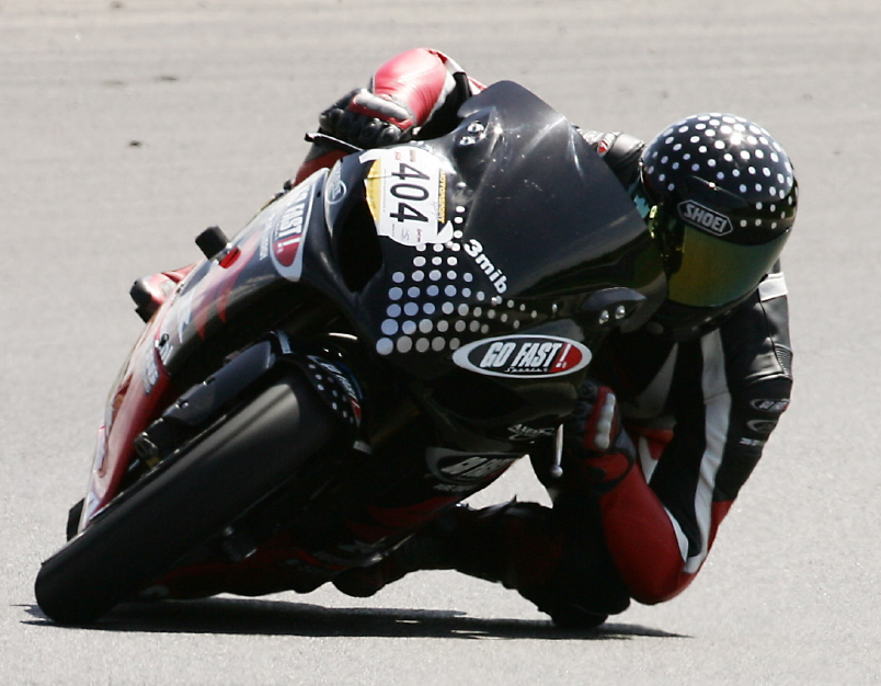 Toestemming van Ramon Verweij